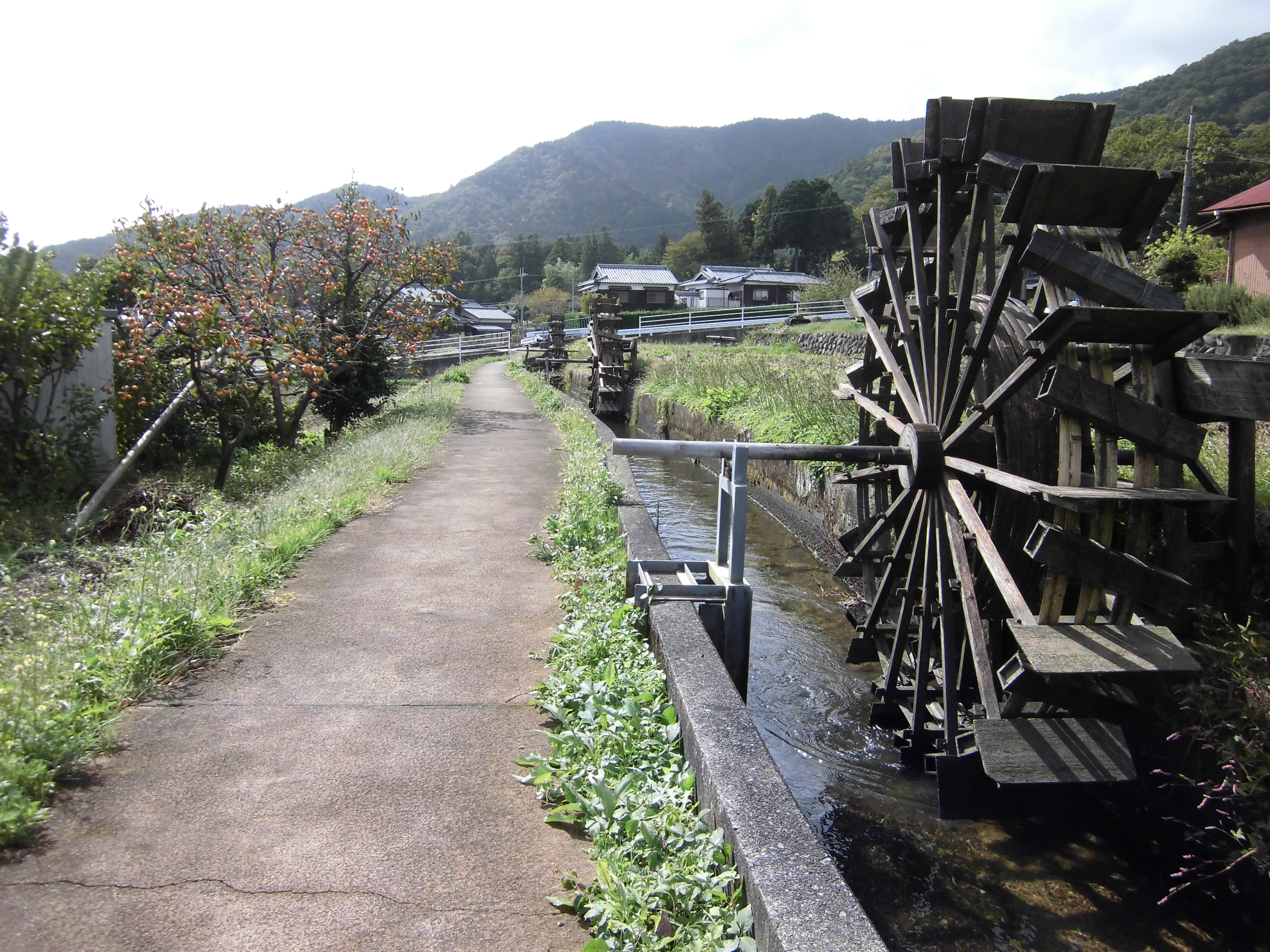 元禄6年（1693年）頃から水路より高い田んぼに水を入れるため水車が使われだした。 珍しい竹枠式の構造で、乾いていると二人で運ぶこともできる。 昭和30年頃には18基の水車が並んでいた。